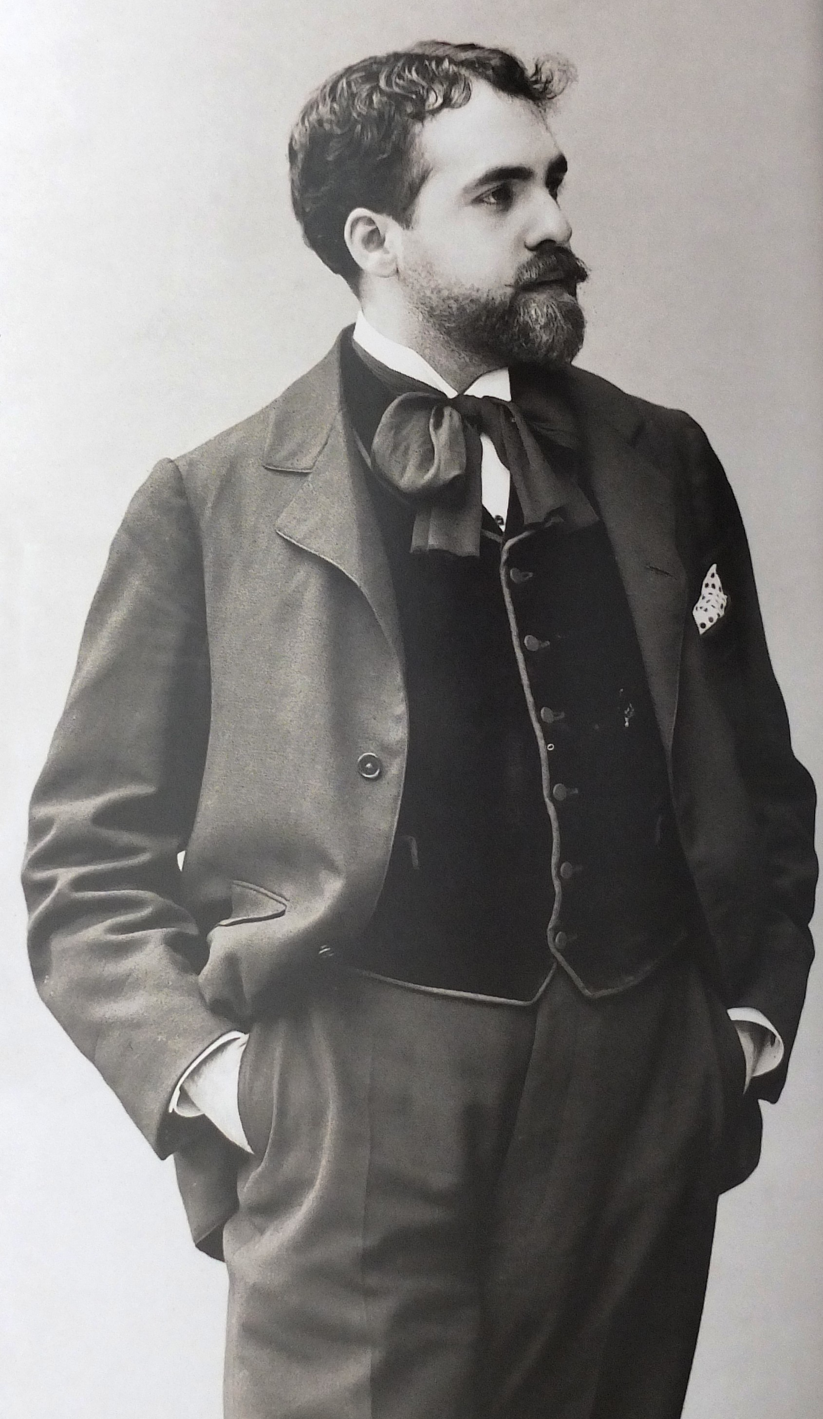 Reynaldo Hahn (1875-1947), photographié en 1898 par Paul Nadar.